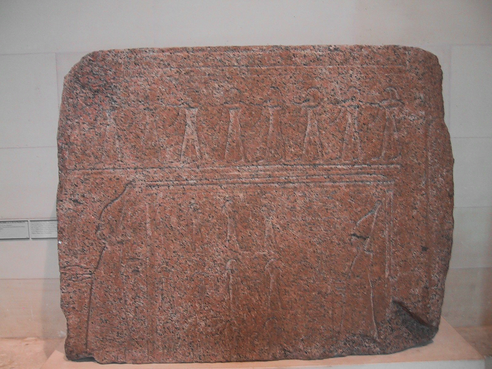 Scène du jubilé, an 22 du roi Osorkon II. 853 avant J.-C. (22e dynastie